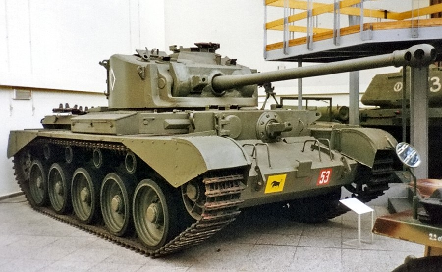 Beschreibung: Comet tank / Armeemuseum Dresden